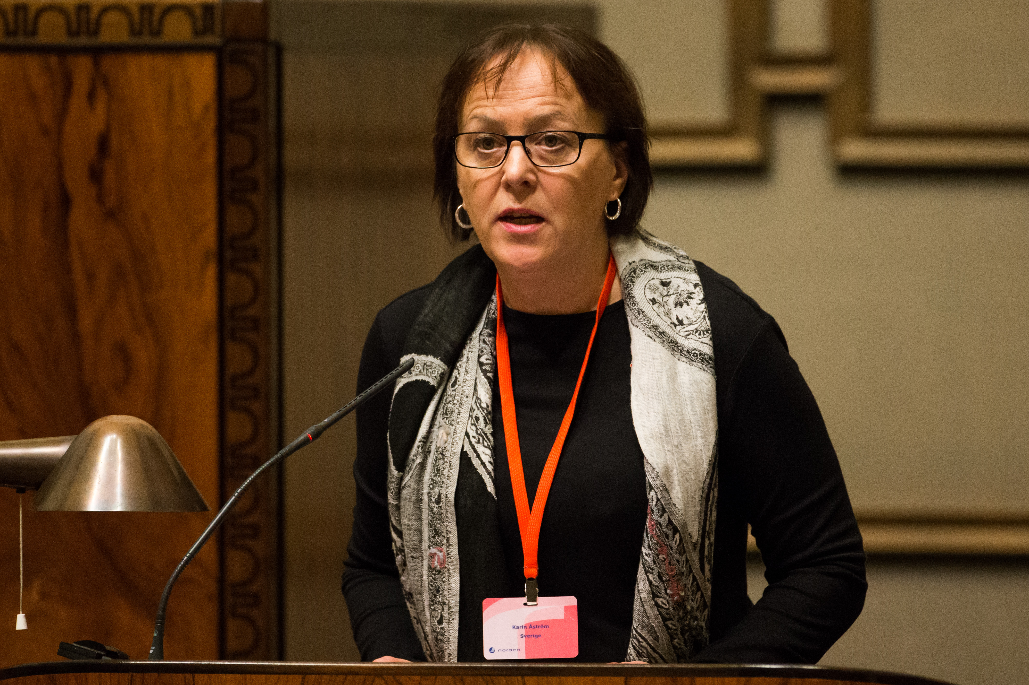 Nordiskt utrikesministermšte vid Nordiska rådets session i Helsingfors 2012. Karin Åström (S)